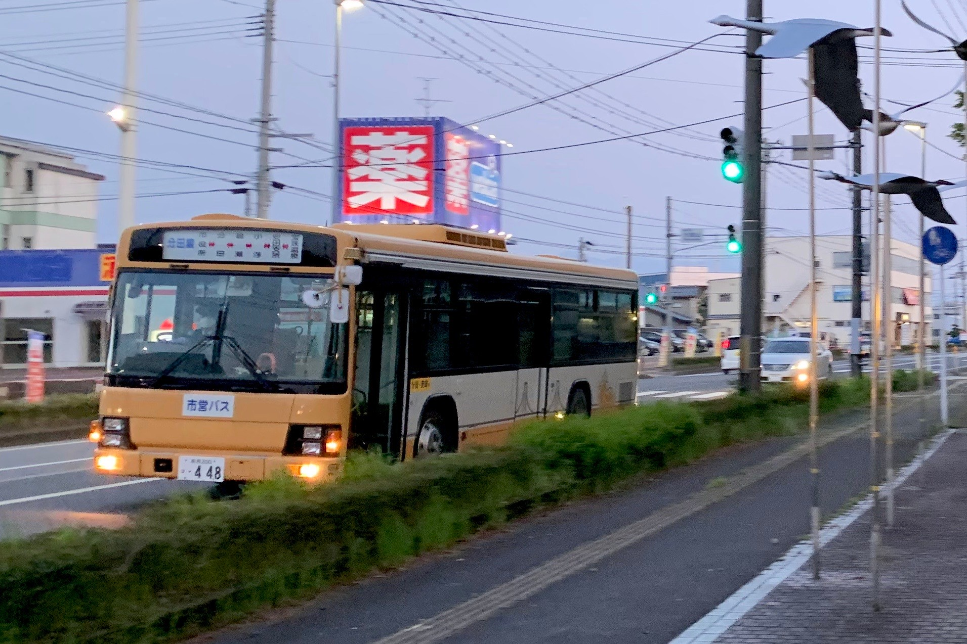 天朝山公園脇の国道49号を走る阿賀野市営バス 分田線（2020年4月）